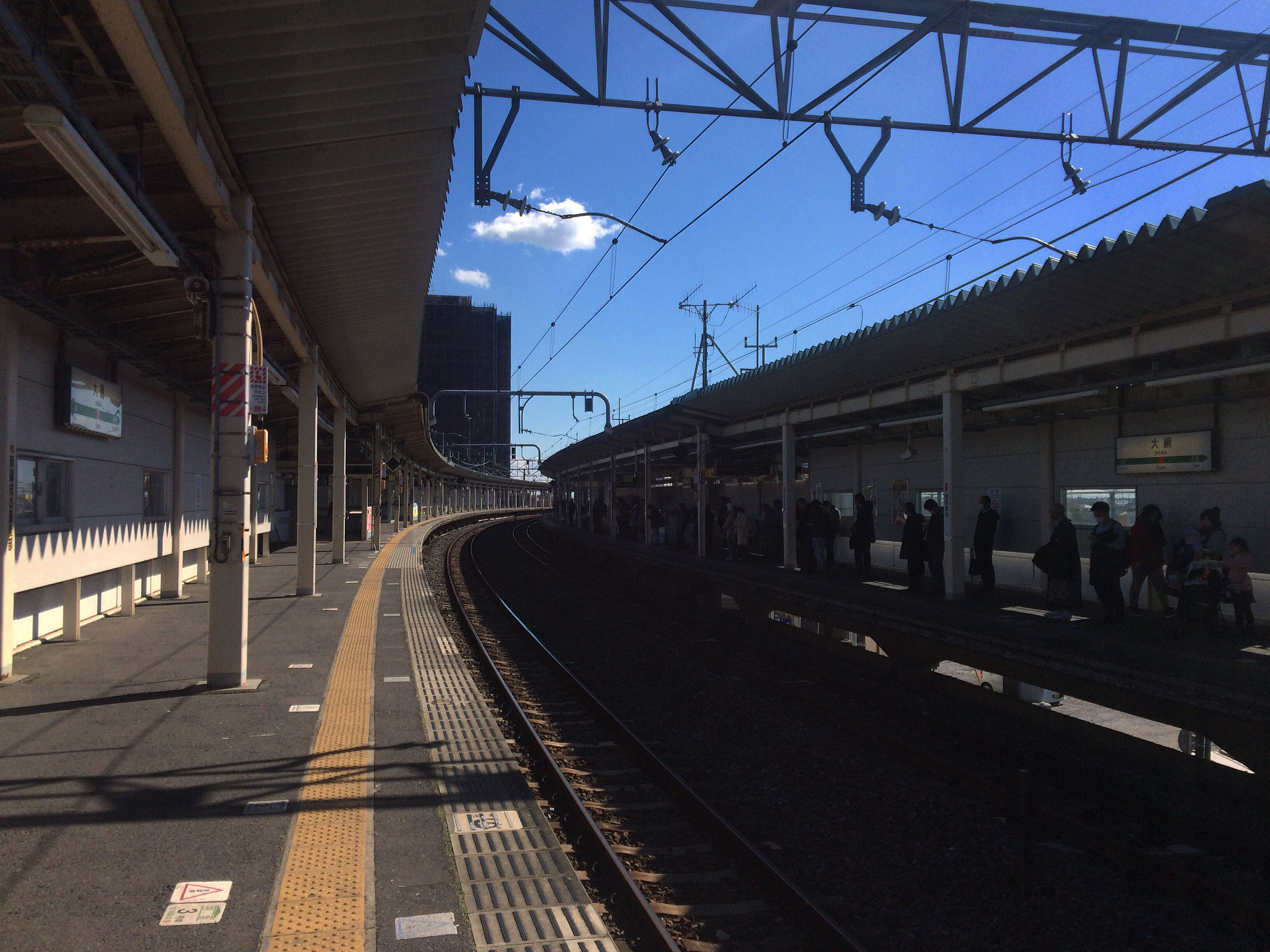 大網駅 外房線ホーム1.2番線